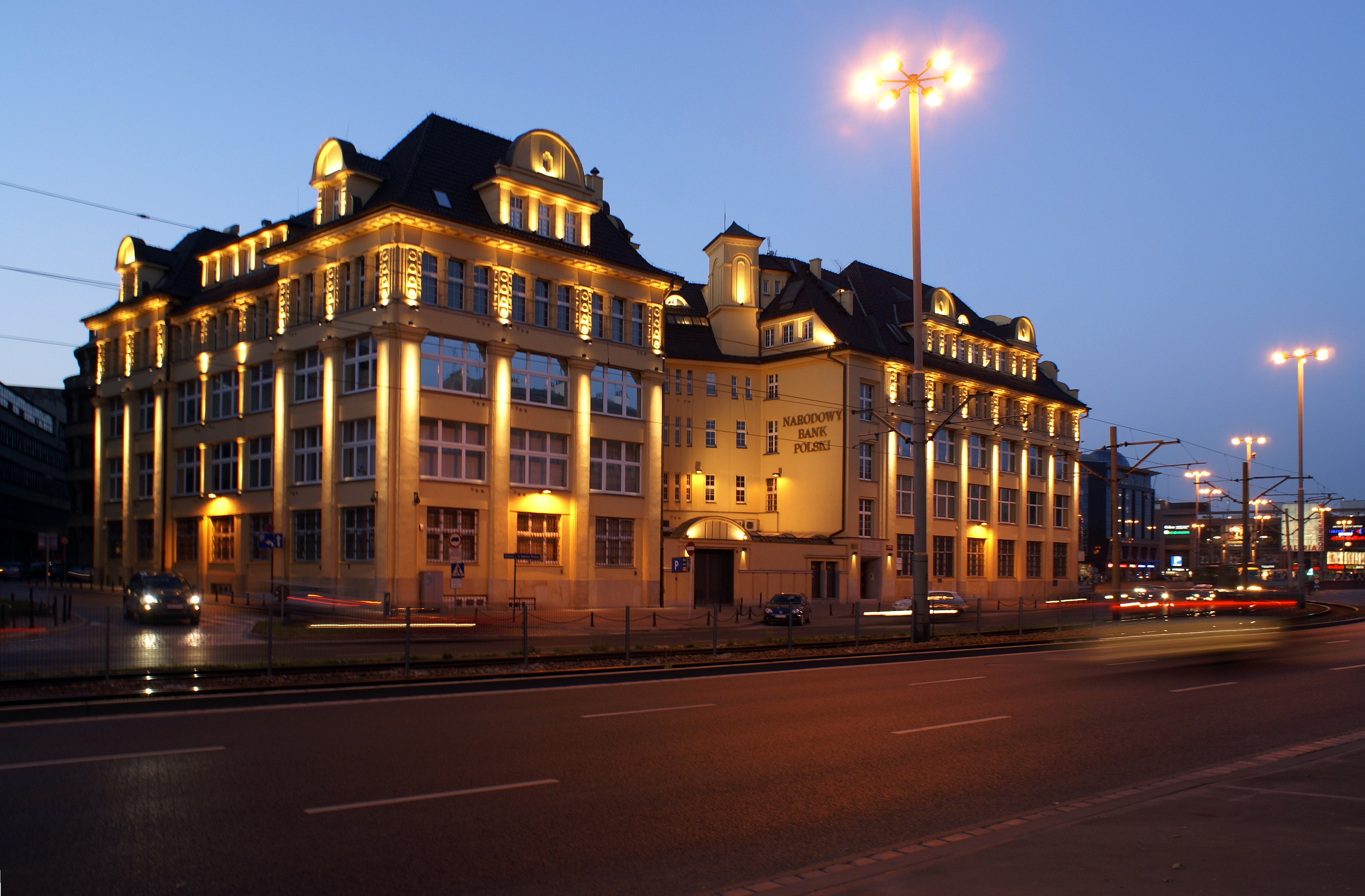 d. biurowiec, ob. Budynek banku NBP Ofiar Oświęcimskich 41/43, Miasto Wrocław - Stare Miasto